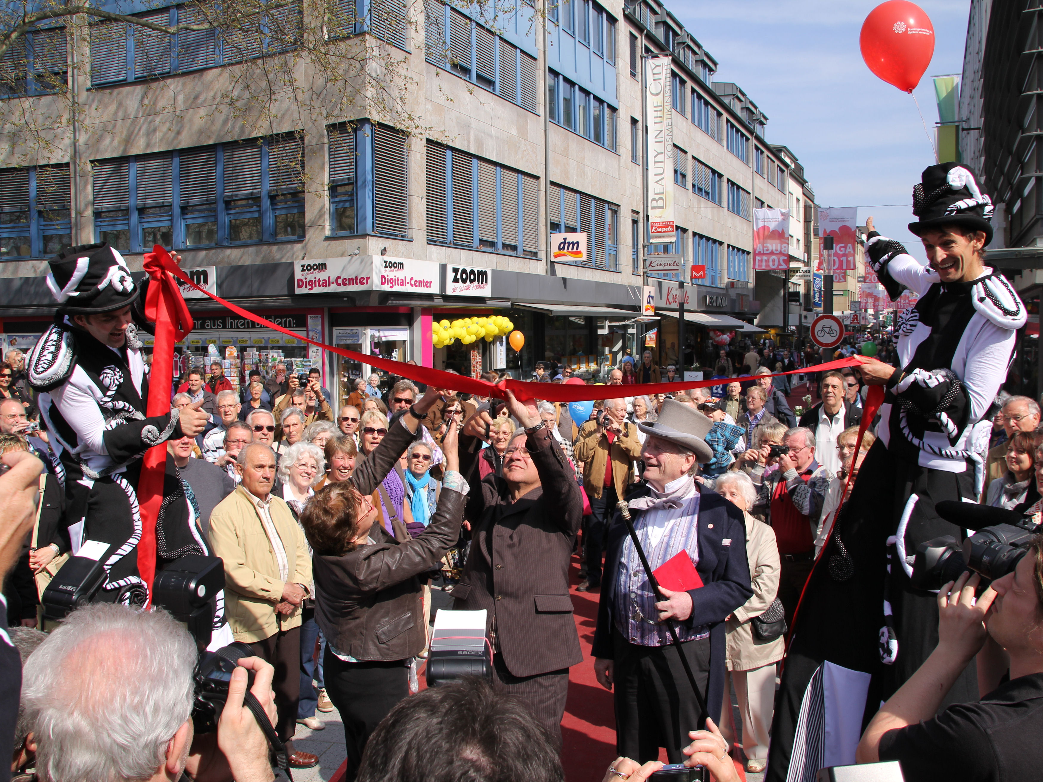 Koblenz im Buga-Jahr 2011 - Eröffnung der sanierten Löhrstraße durch Oberbürgermeister Joachim Hofmann-Göttig